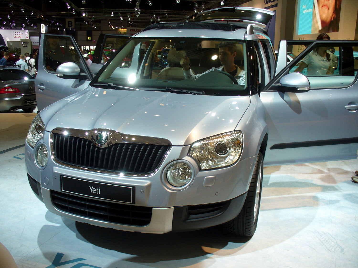 Škoda Yeti